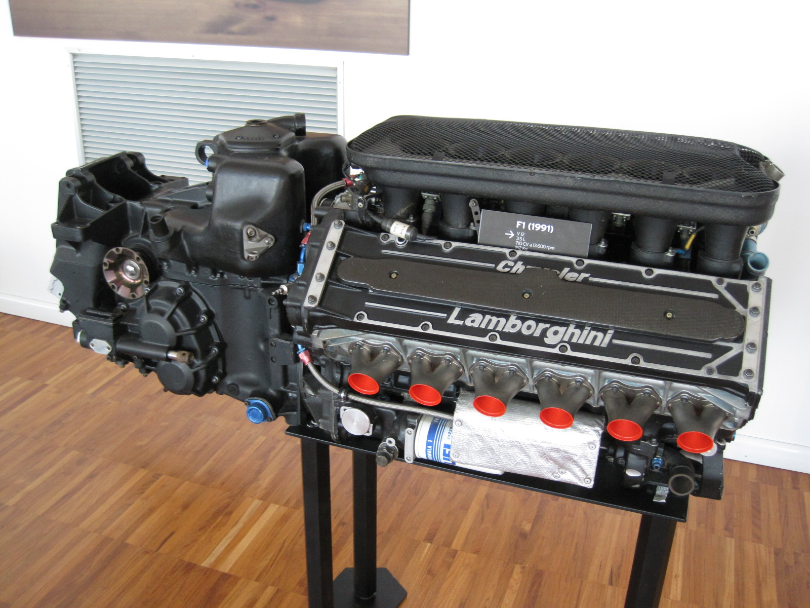 Musée Lamborghini - Moteur F1 - V12 - 3,5 Litres - 1991